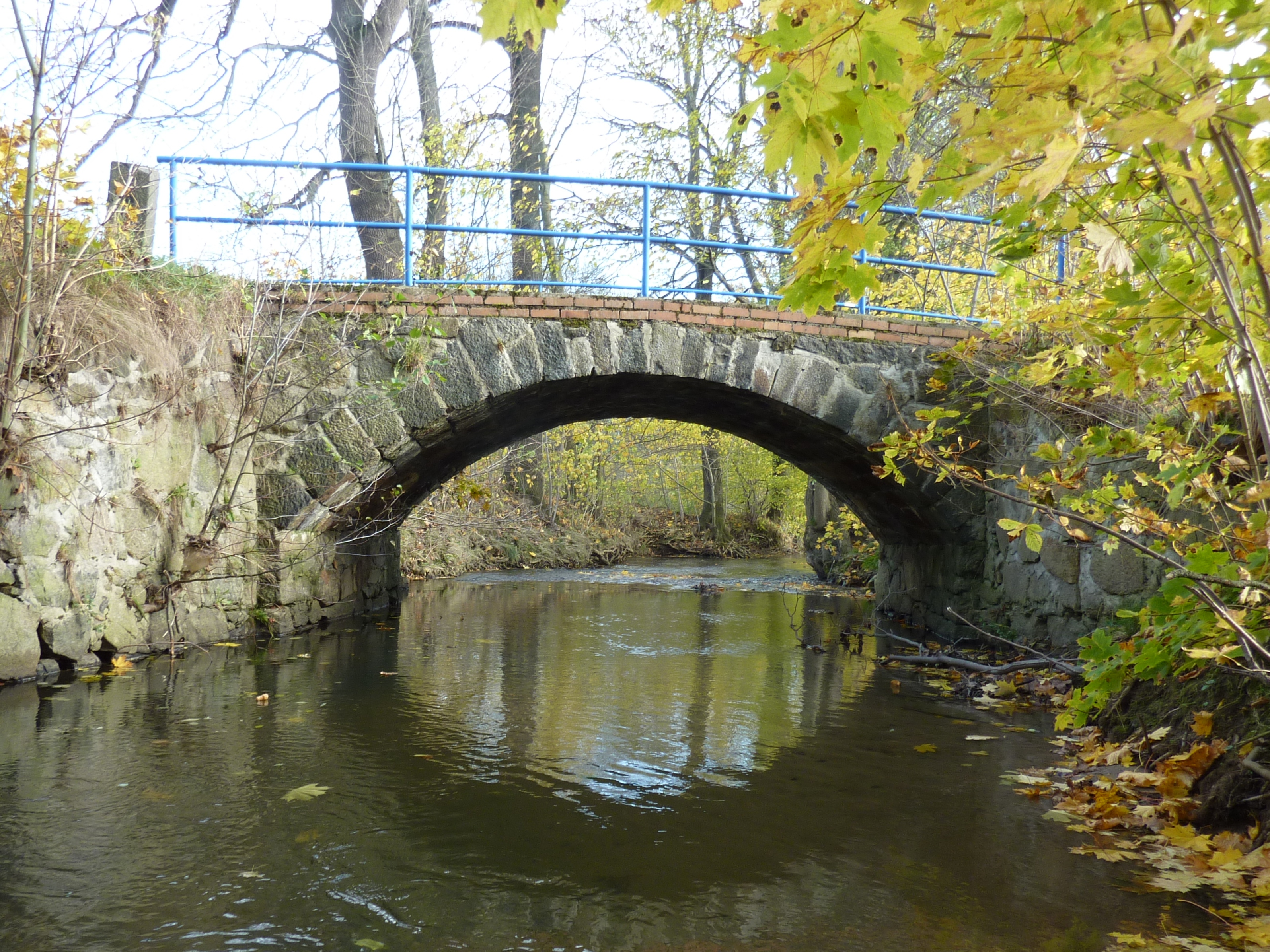 Brücke über das Großschweidnitzer Wasser an der Thomas-Müntzer-Straße.